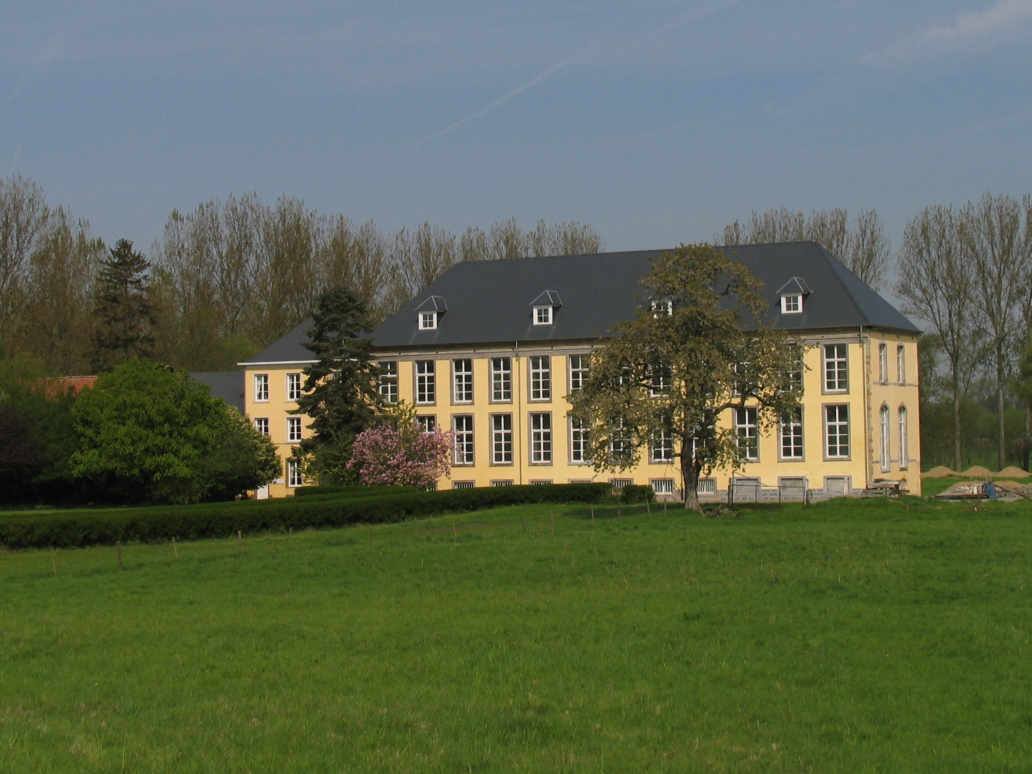 Geraardsbergen - Grimminge - Abdij van Beauprez This photo of immovable heritage has been taken in the Flemish Region